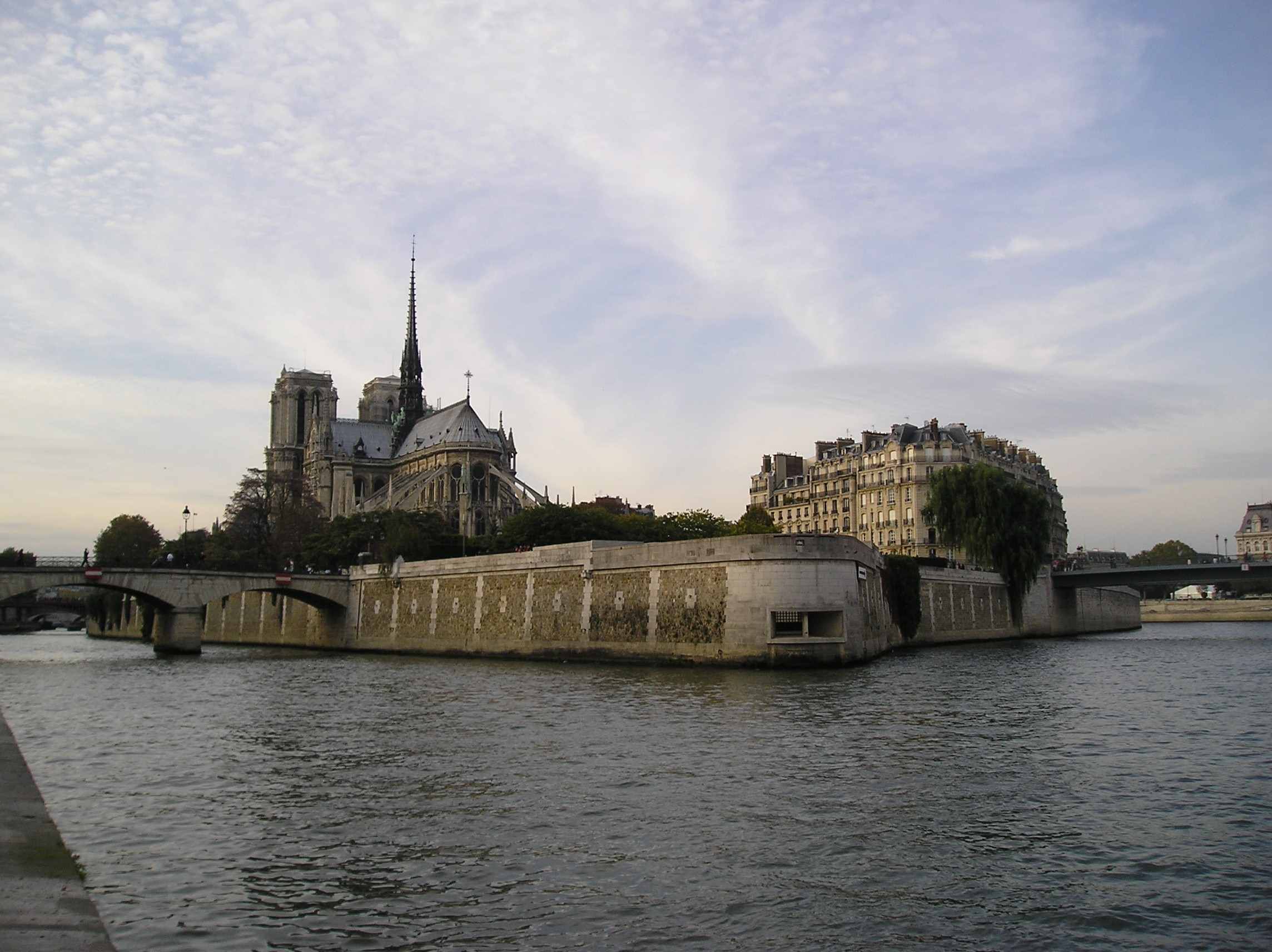 Paris, Île de la Cité, pointe est avec, au premier plan, le Mémorial des Martyrs de la Déportation. Photo prise du Port de la Tournelle Date Octobre 2004 Photographe amateur Photographie prise par François Trazzi